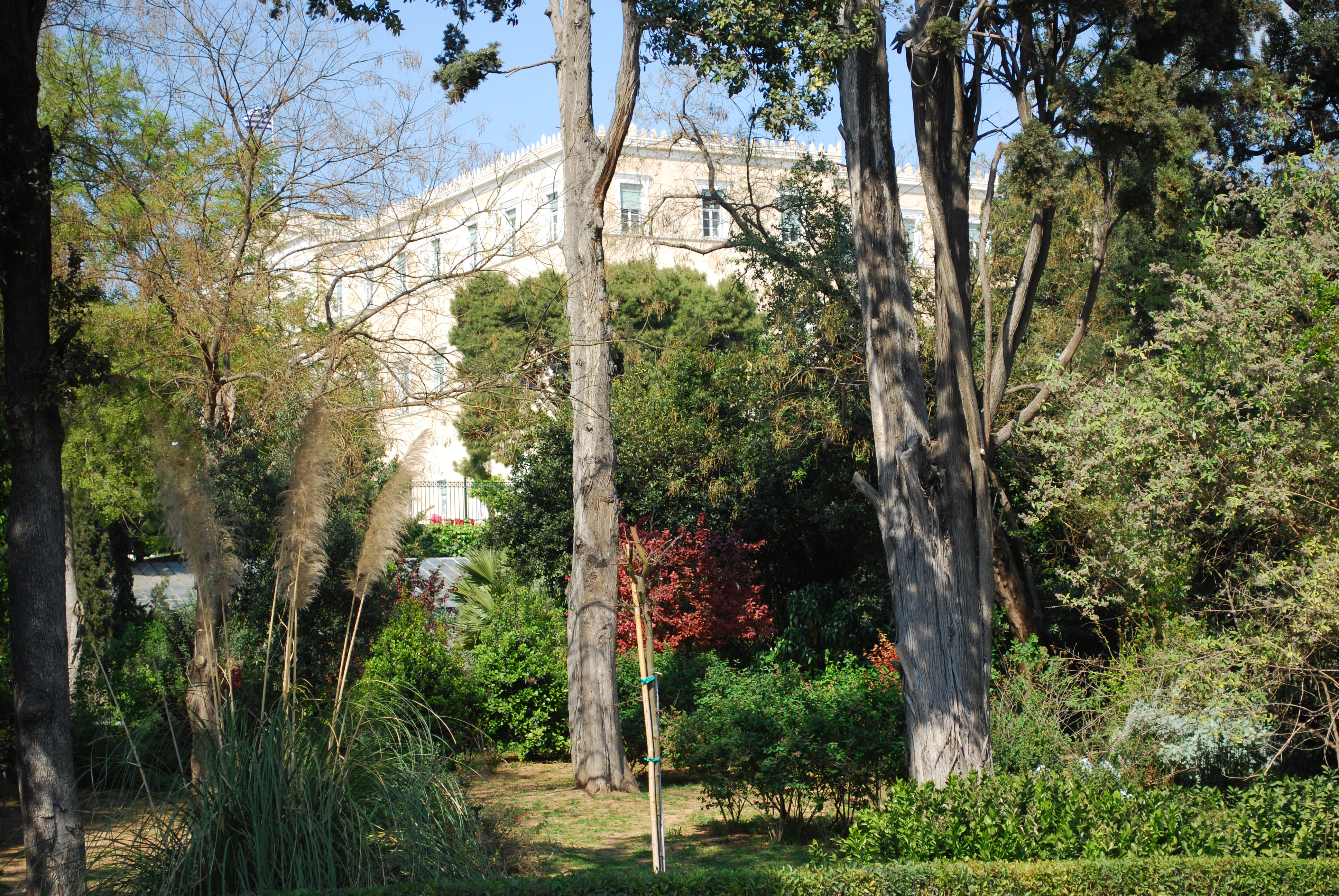 Athènes : le Jardin National.